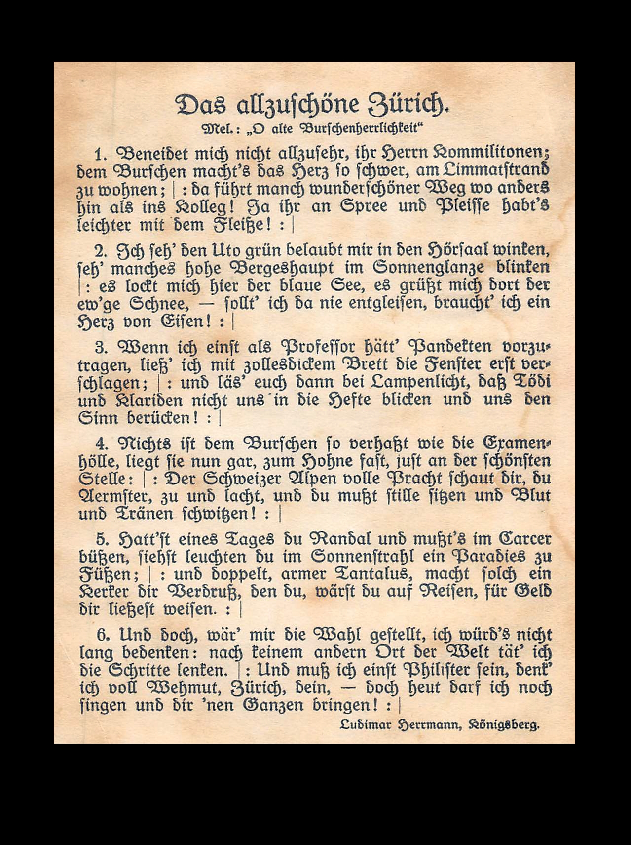 Lied "Das allzuschöne Zürich", komponiert von Lidmar hermann (1838-1914)